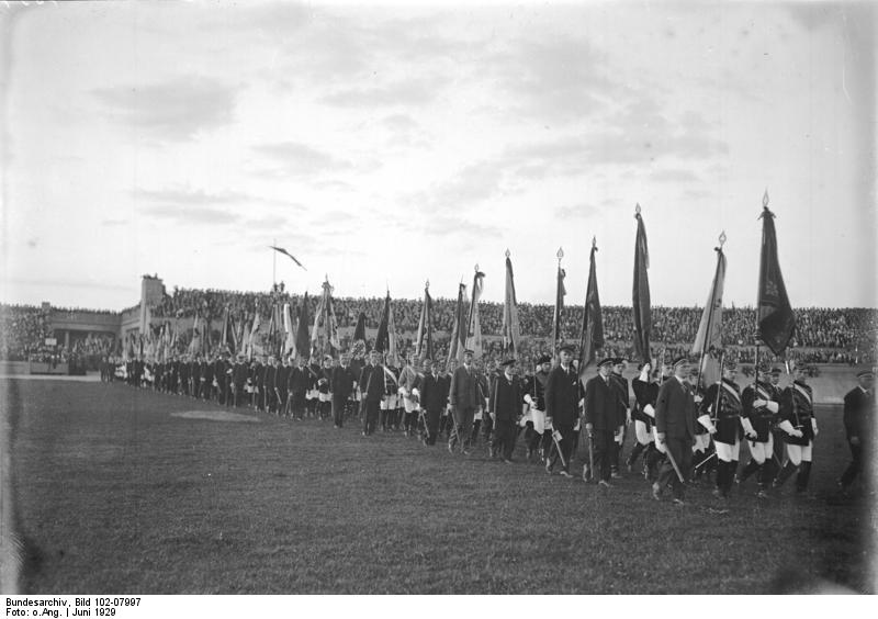 Die grosse Kundgebung 10 Jahre Versailles im Berliner Stadion! Über 50 tausend Menschen wohnten der Feier bei. Abordnungen Berliner Studenten in Wichs ziehen mit wehenden Fahnen ins Stadion ein.